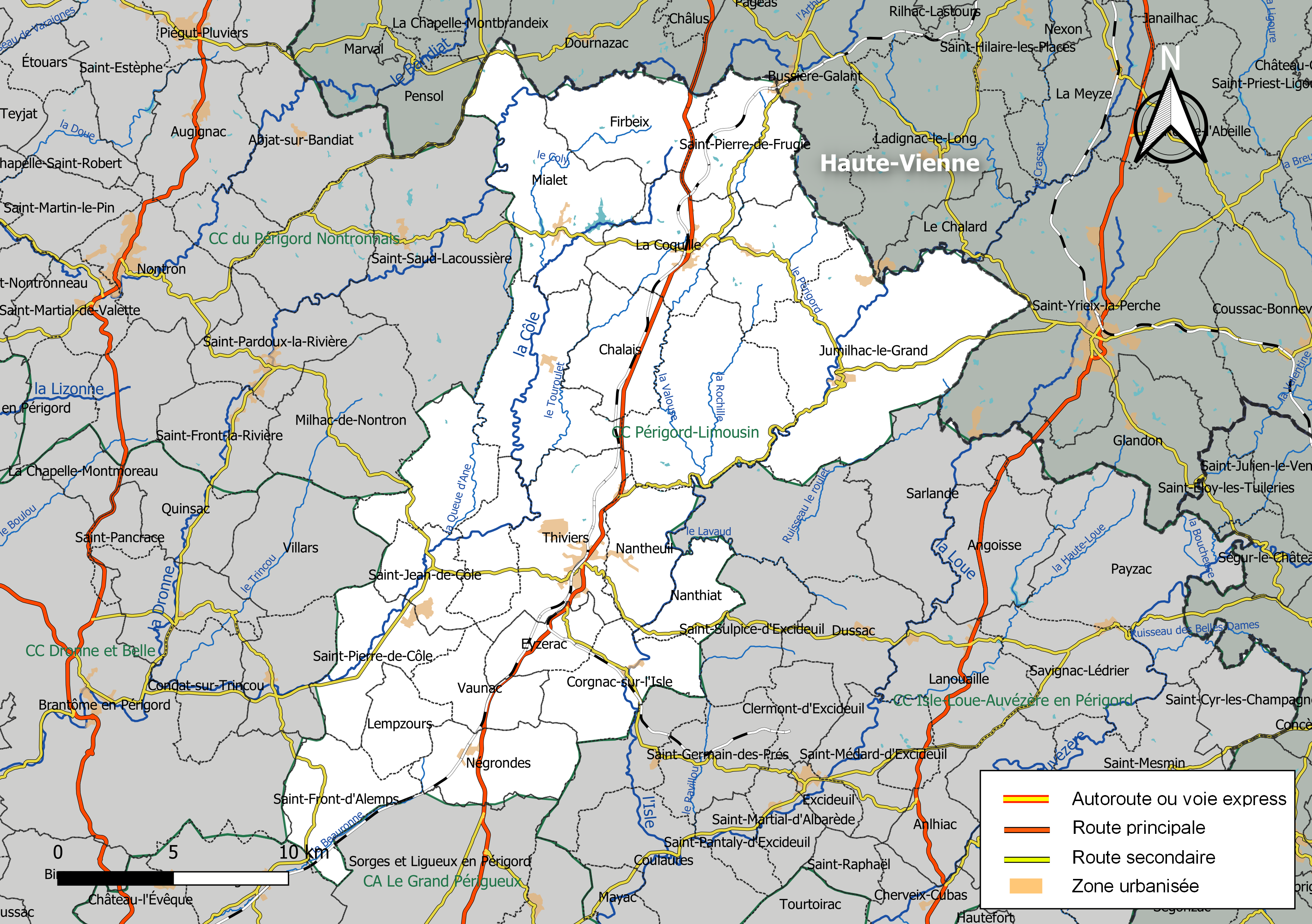 Carte géographique de la Communauté de communes Périgord-Limousin, département de la Dordogne, France. Composition au 1er janvier 2019.